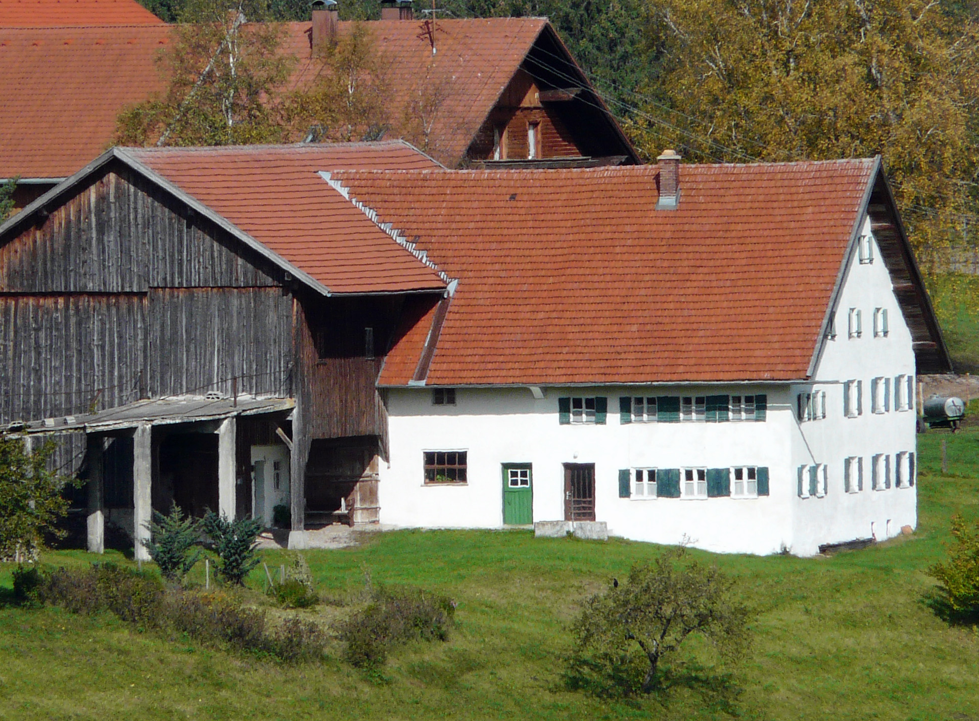 Birkenberg 1, Rettenbach a. A.